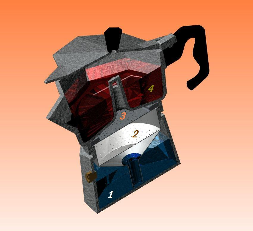 Vue en coupe d'une cafetière Moka. Internal view of a coffee maker. Image réalisée avec logiciel SolidWorks